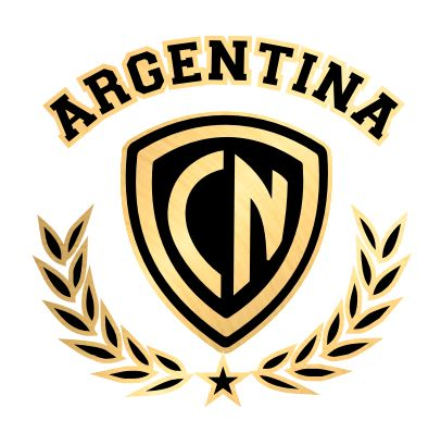 CN Sports